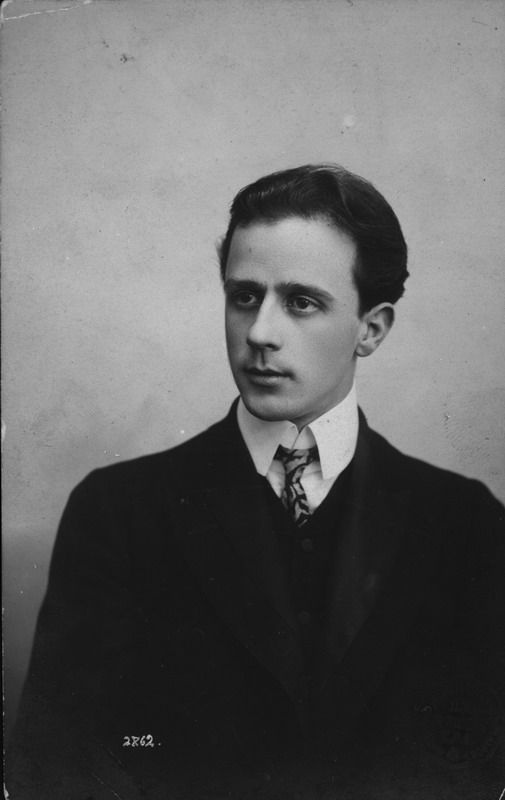 Михаил Михайлович Фокин